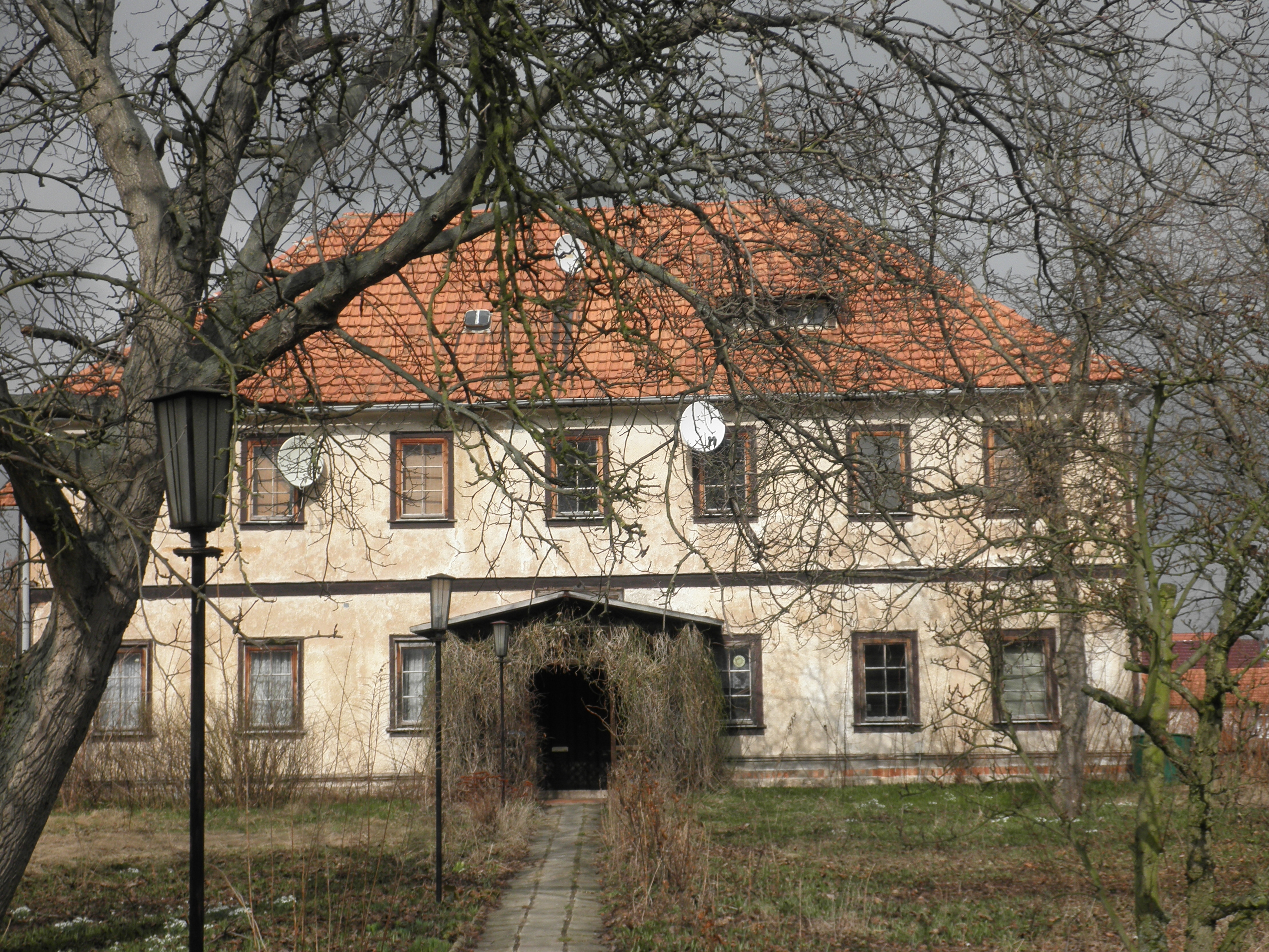 Pfarrhaus Döllstedt